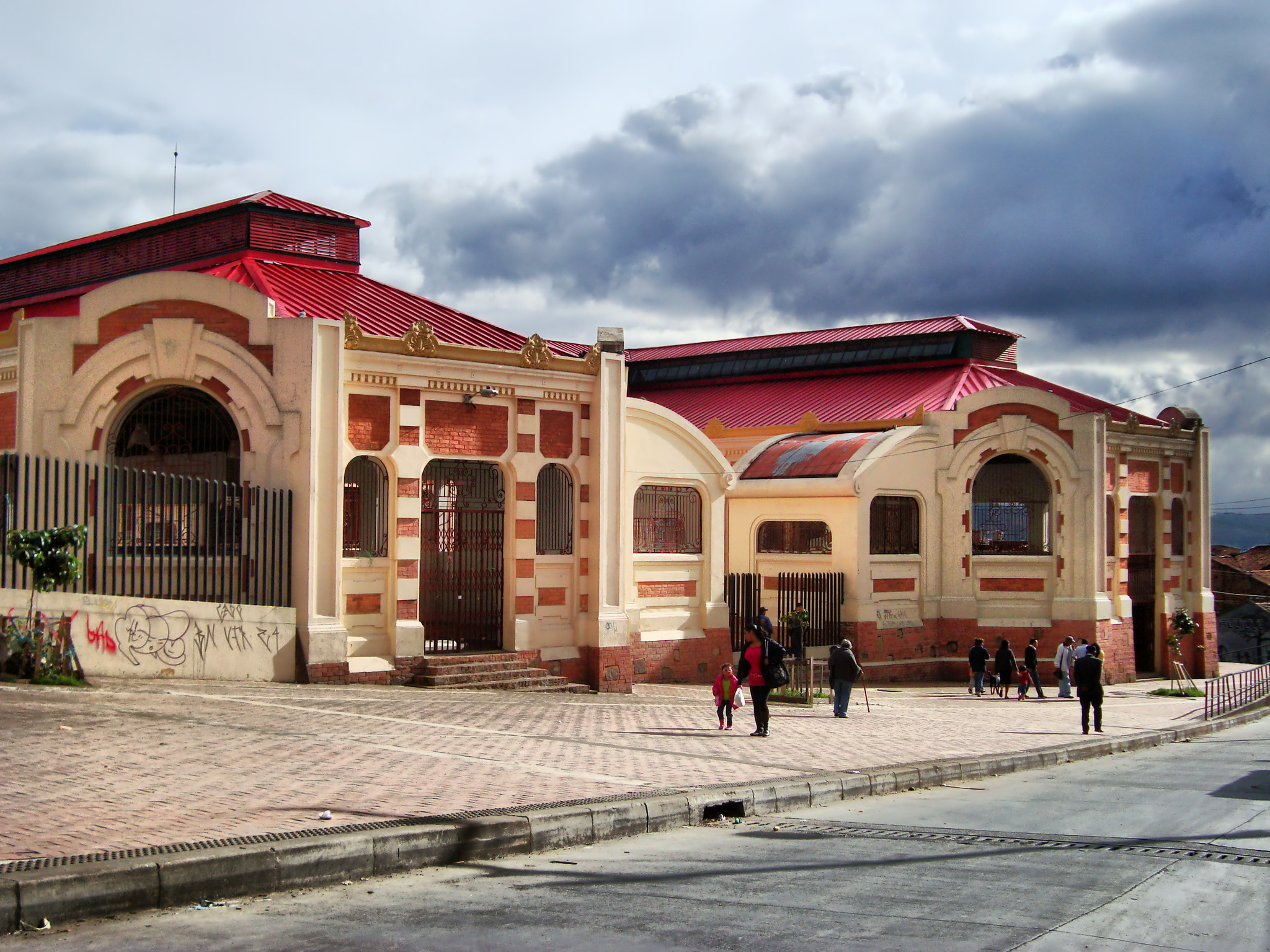 Edificio de la Plaza Galería del Mercado del barrio Las Cruces